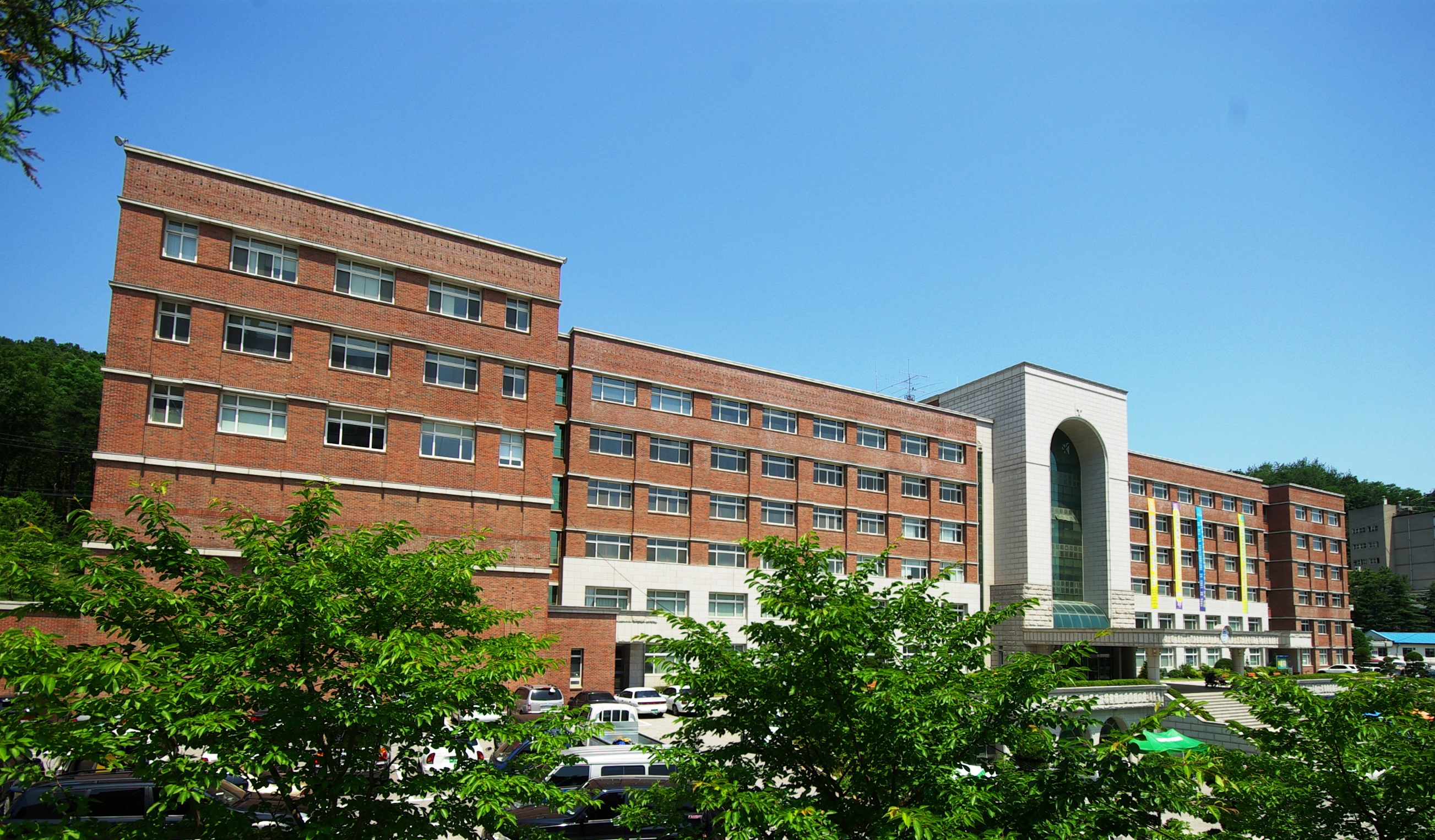 경기도 의정부시에 있는 경민대학교 본관 건물입니다. 건물외벽에는 기독교를 상징하는 십자가 무늬가 그려져 있는 특징을 보입니다.